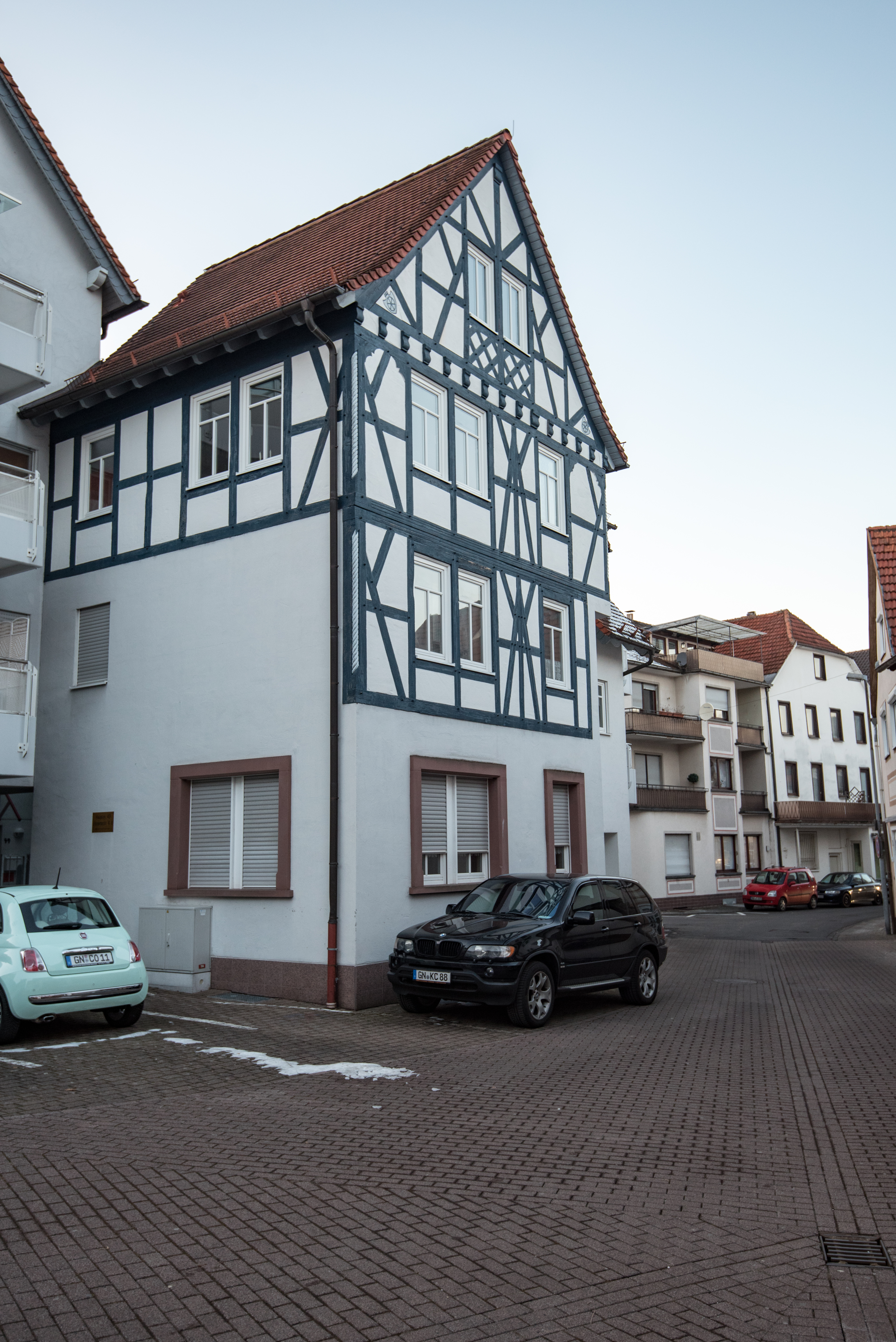 Bad Orb, Jössertorstraße 4 und 6